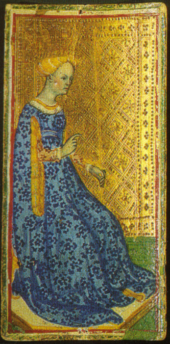 Regina di spade